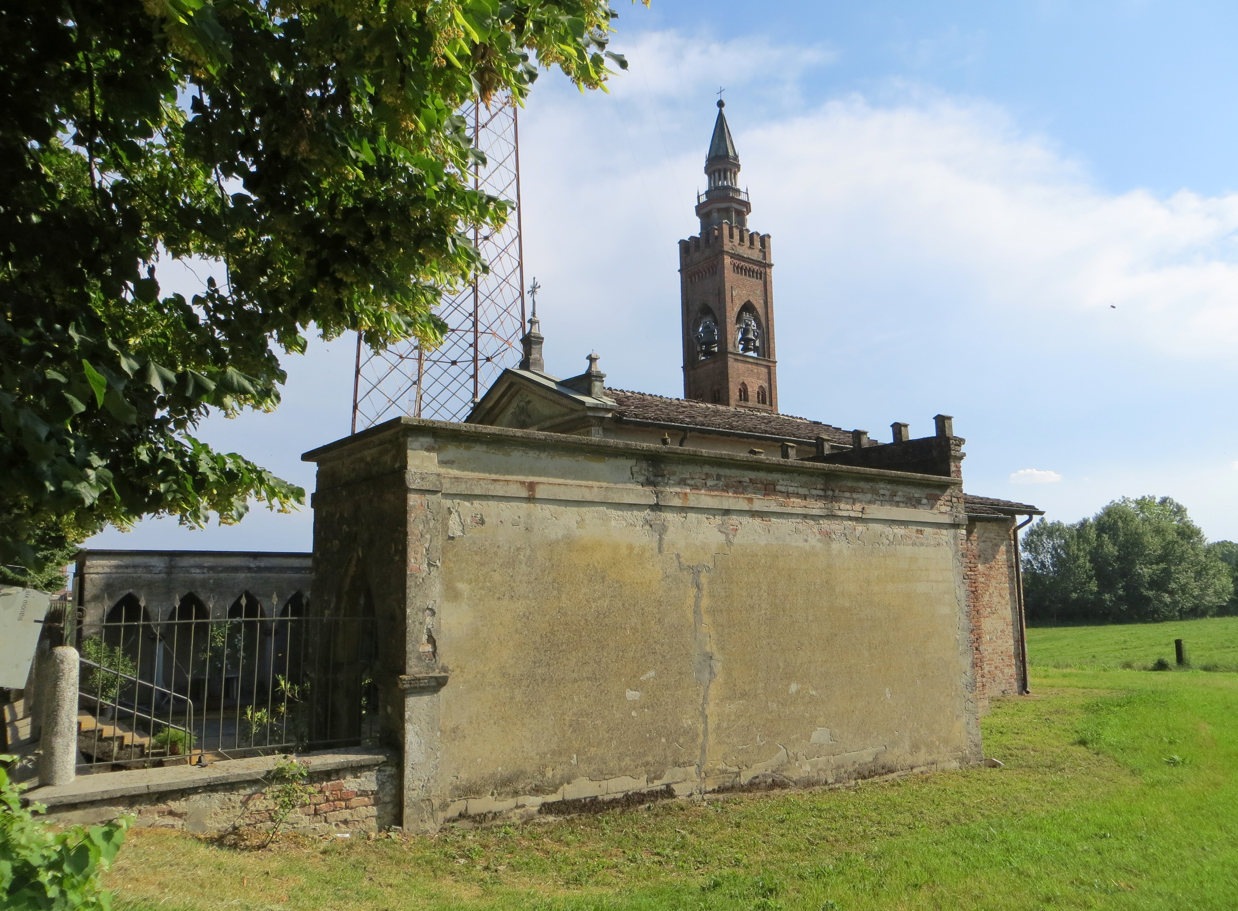 Chiesa della Beata Vergine di Loreto (Polesine Parmense) - lato nord